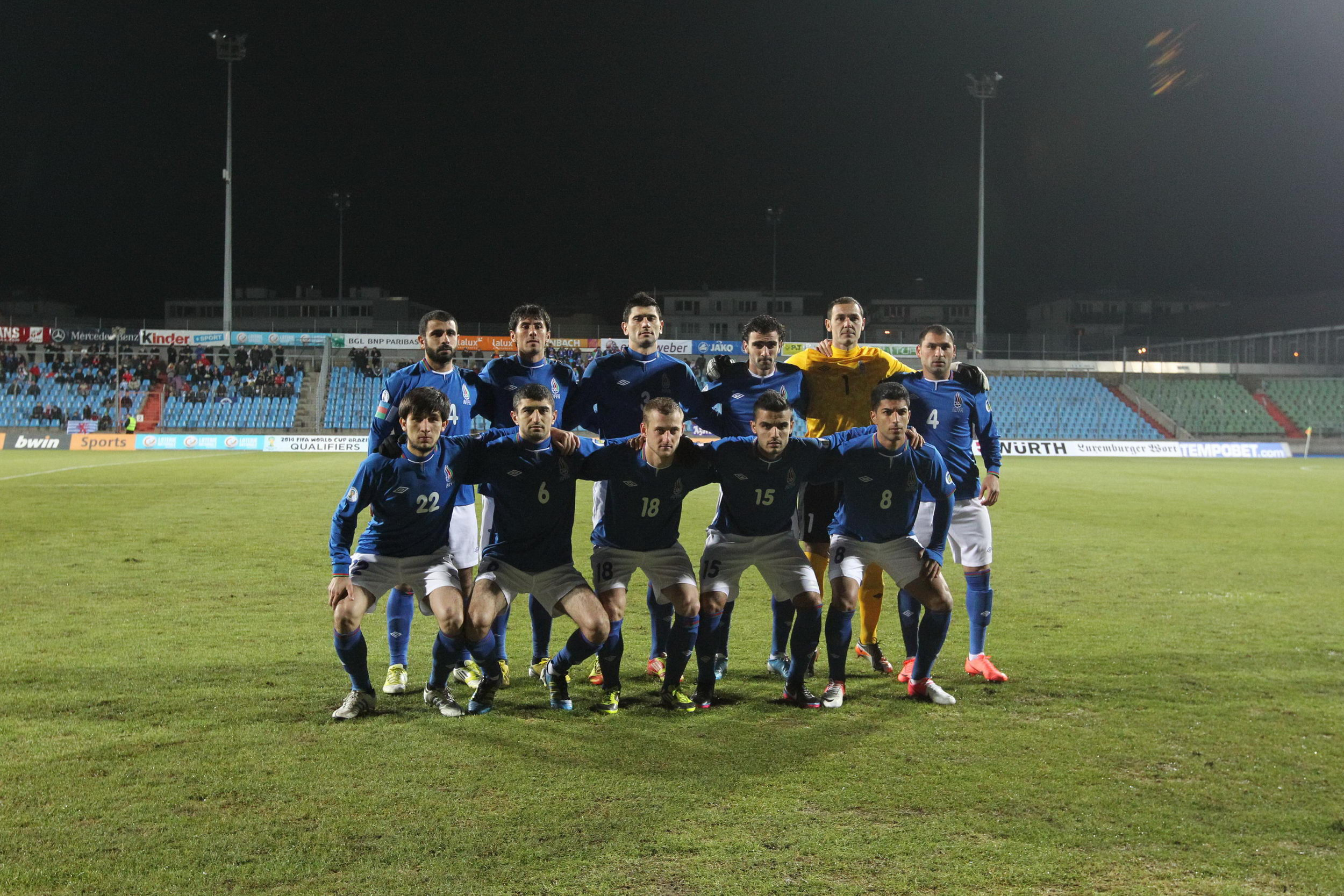 Azərbaycan milli futbol komandası